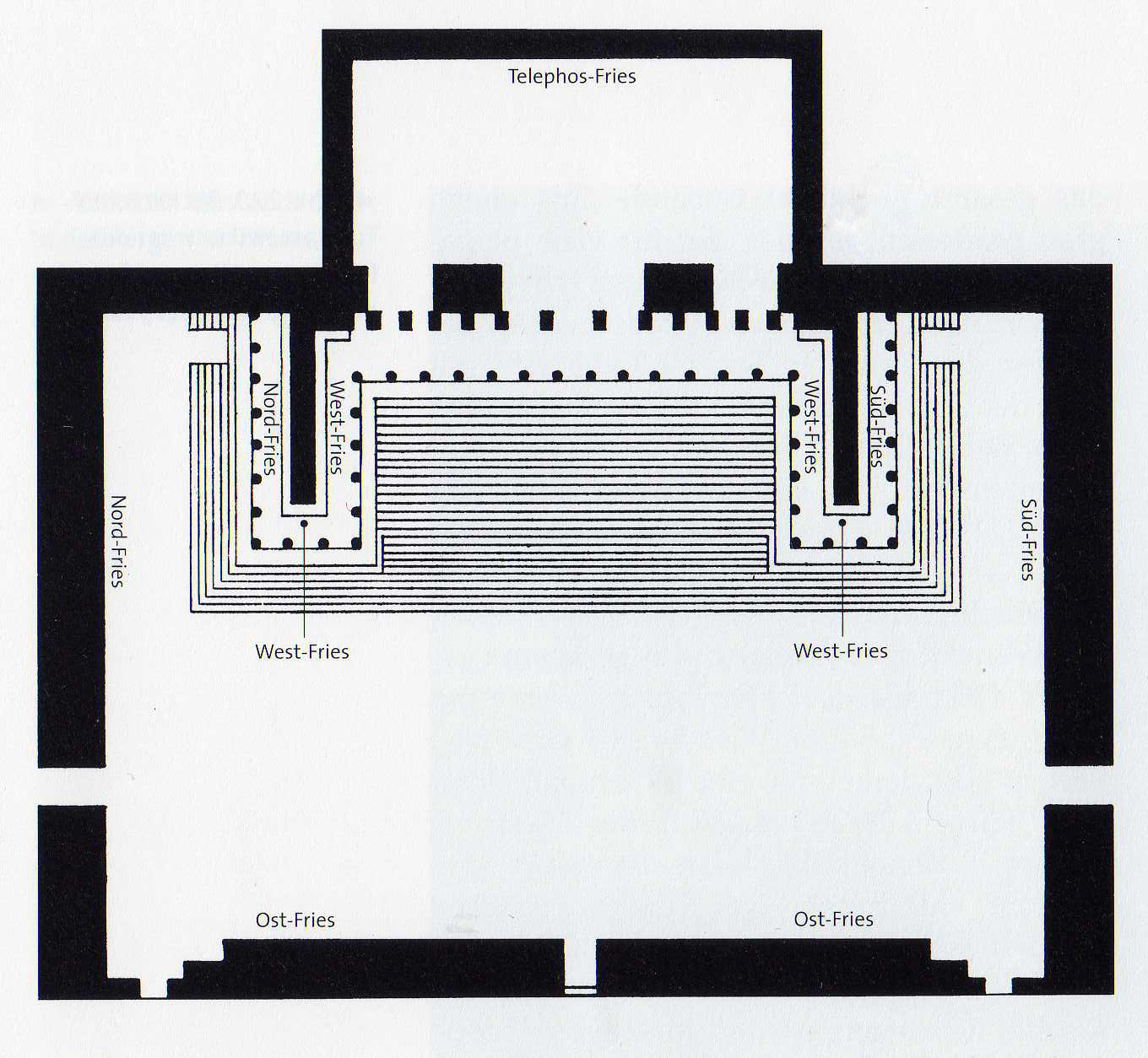 Grundriss des Pergamonaltars in der Aufstellung im Pergamonmuseum